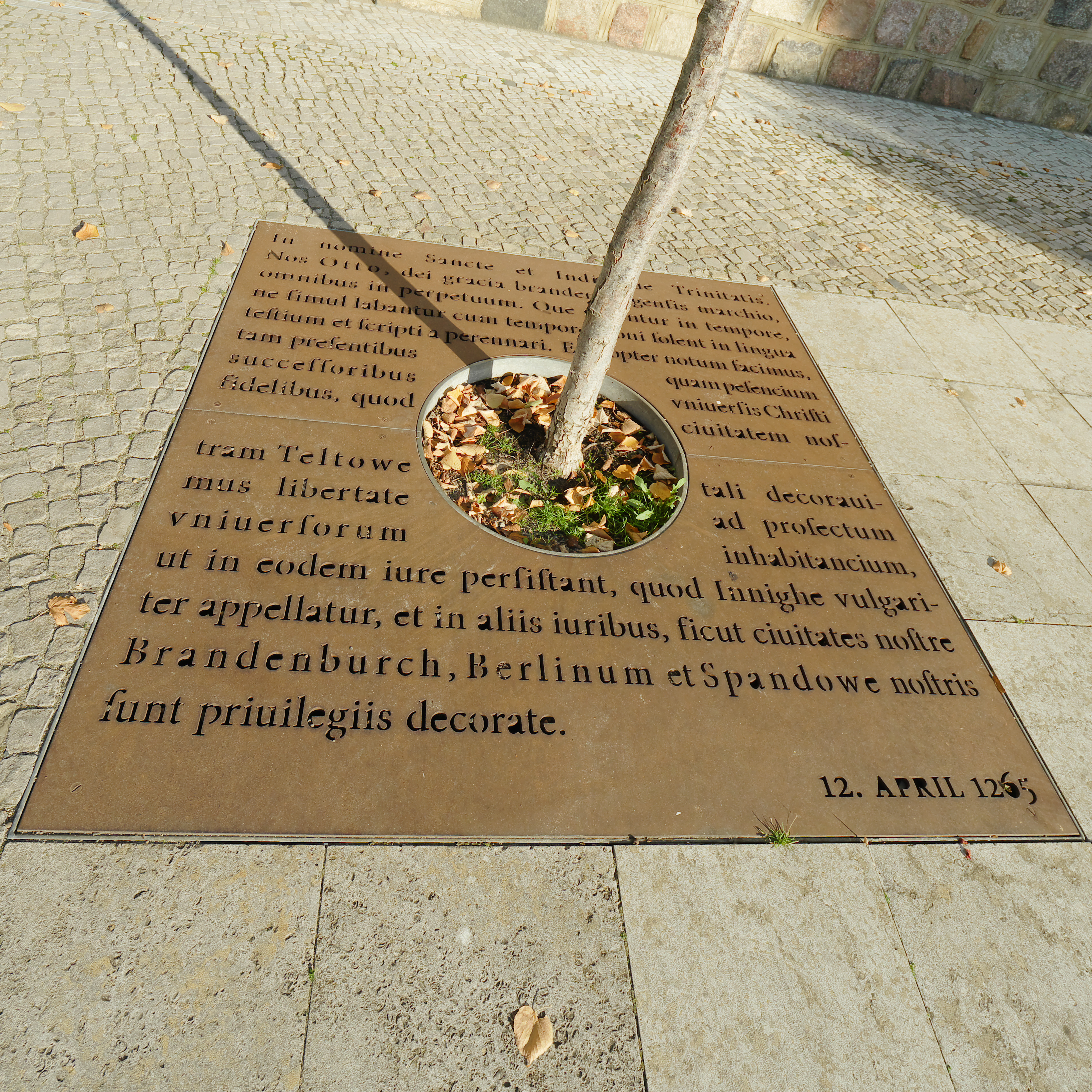 Lateinischsprachige Gedenktafel mit Urkundentext vom 12. April 1265 vor der Stadtkirche Sankt Andreas in Teltow